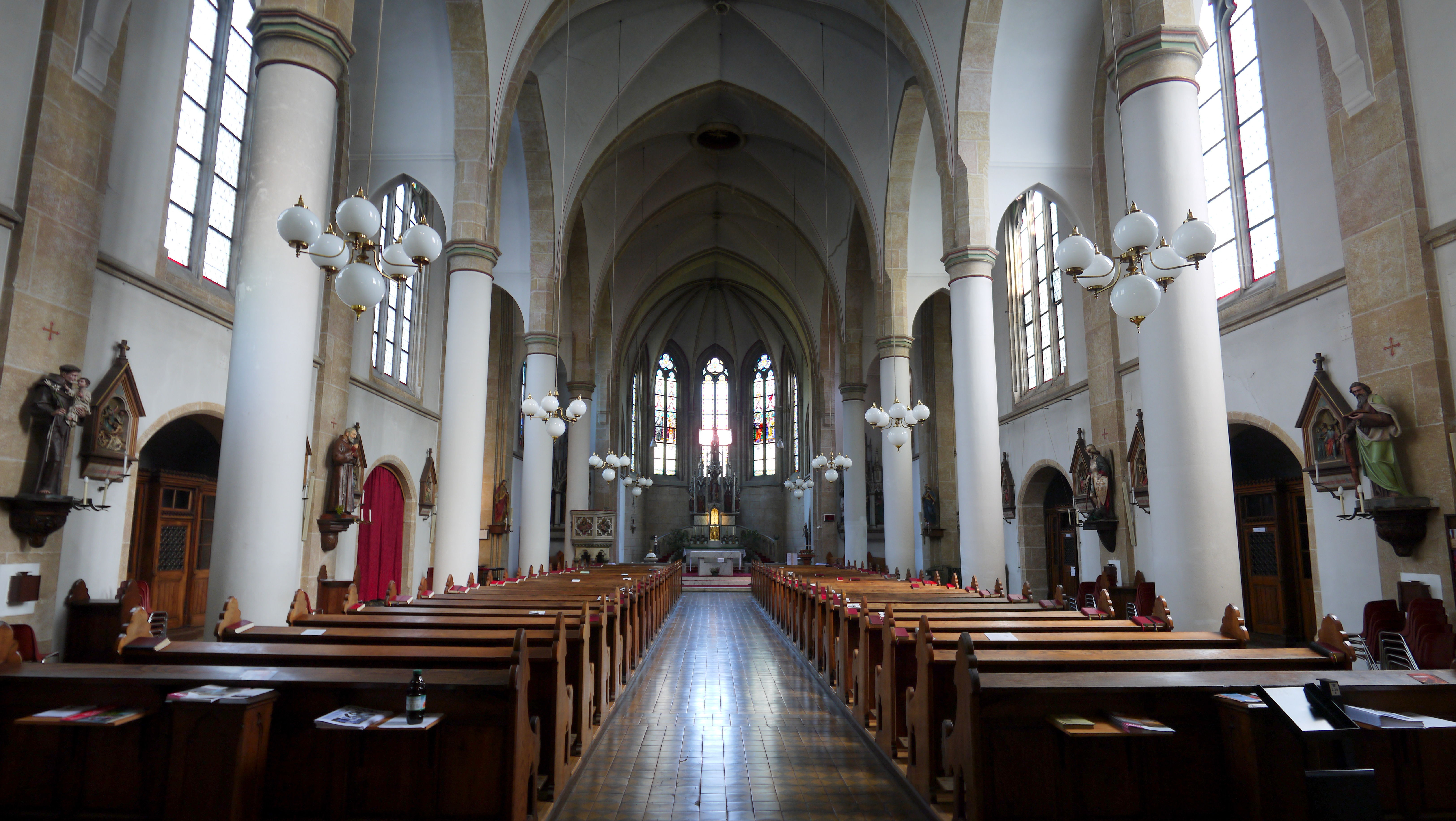 Lazaristenkirche